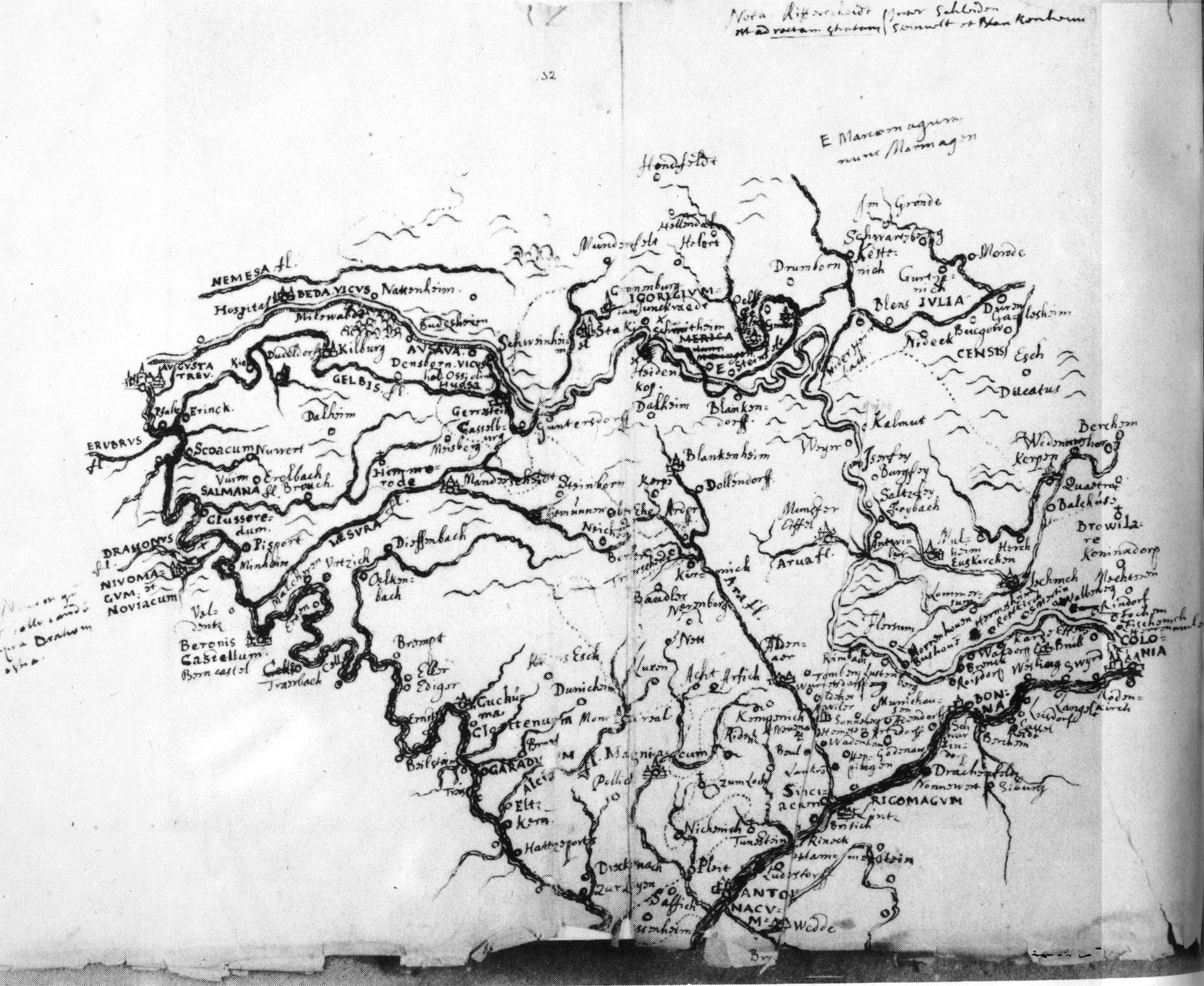 Eifelkarte von Alexander von Wiltheim (1630-1682)